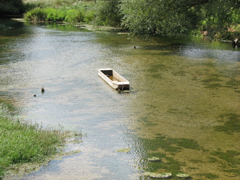 Plav, Gacka, Croatia. Plav je brodica koji su rabili žitelji Gacke u gornjem toku rijeke. Naziv potječe od staroslavenskoga jezika "plavati", što znači plivati.